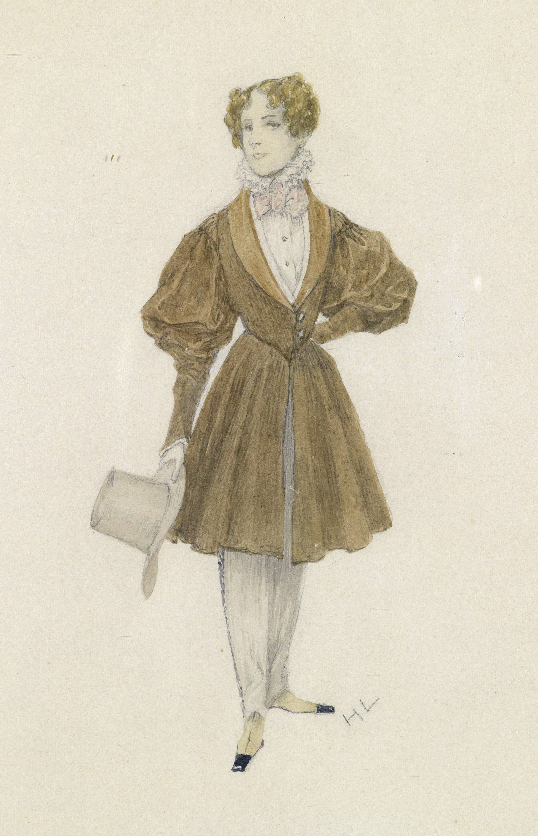 Erzherzog Carl Franz Joseph im Biedermeier-Theaterkostüm (Entwurf: Heinrich Lefler) bei der Huldigung der Jugend des Kaiserhauses für Kaiser Franz Joseph am 1. Dezember 1908 in Schönbrunn